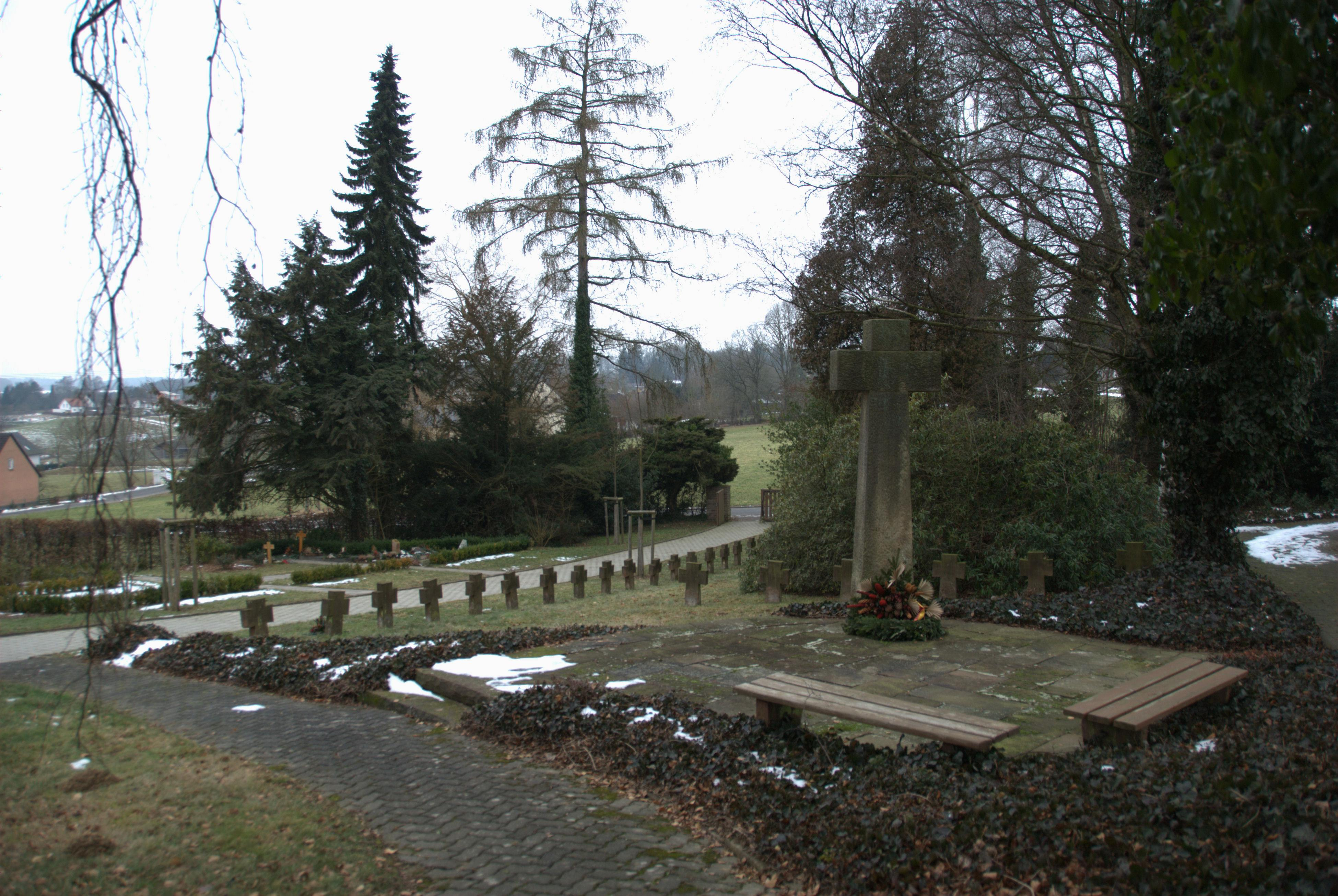 Opfer Brücke von Remagen